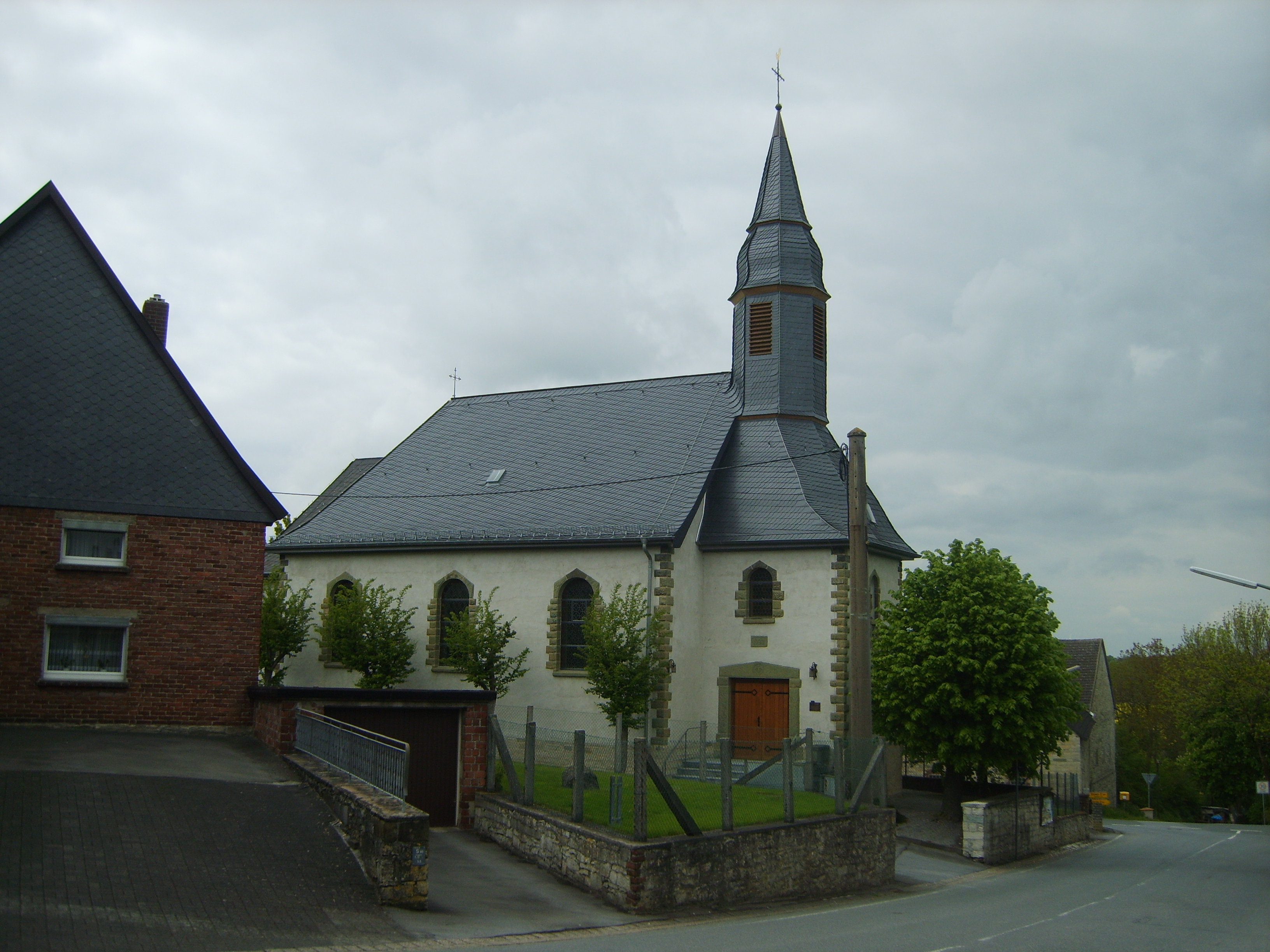 St. Barbara und St. Antonius Kirche in Warstein-Waldhausen. Denkmalschutz seit 30. Juni 2008.